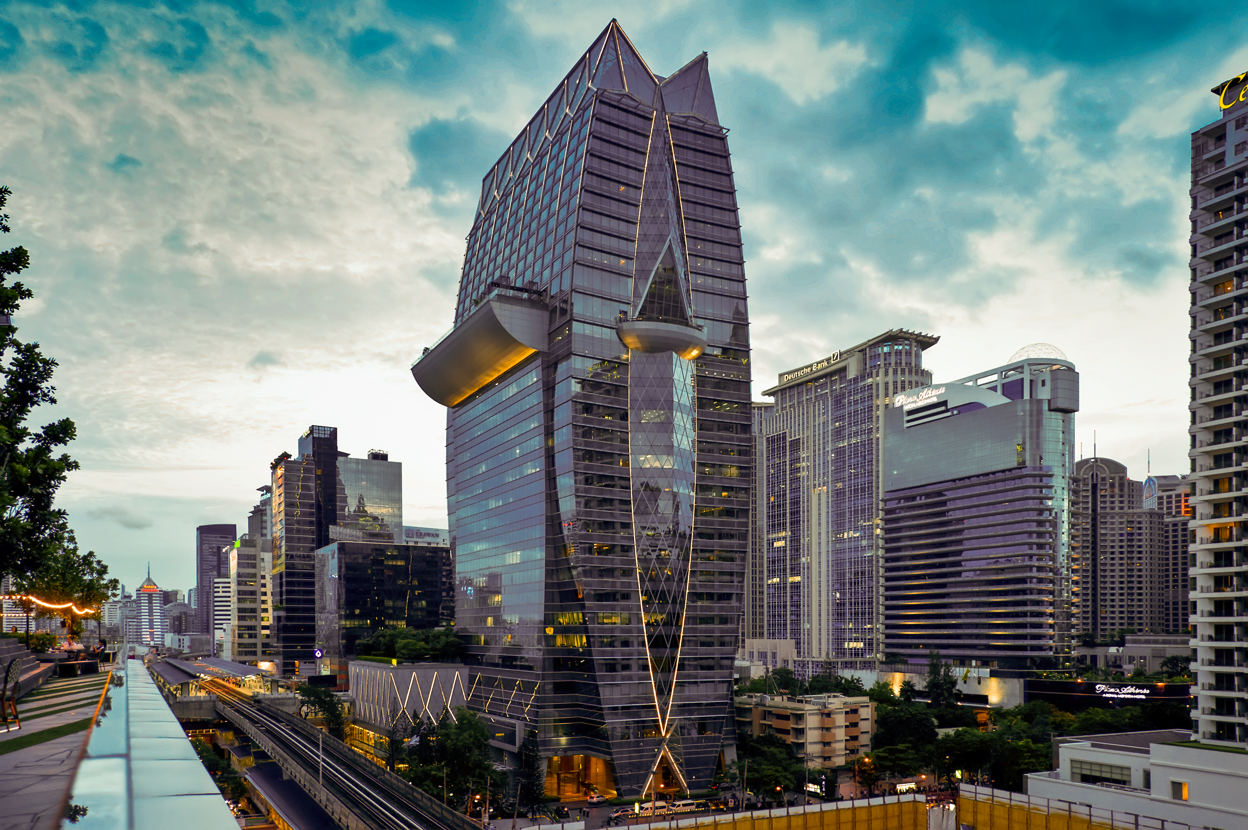 Blick auf das Park Ventures Hotel vom Prada Einkaufscenter - Thanon Phloen Chit in Bankgok